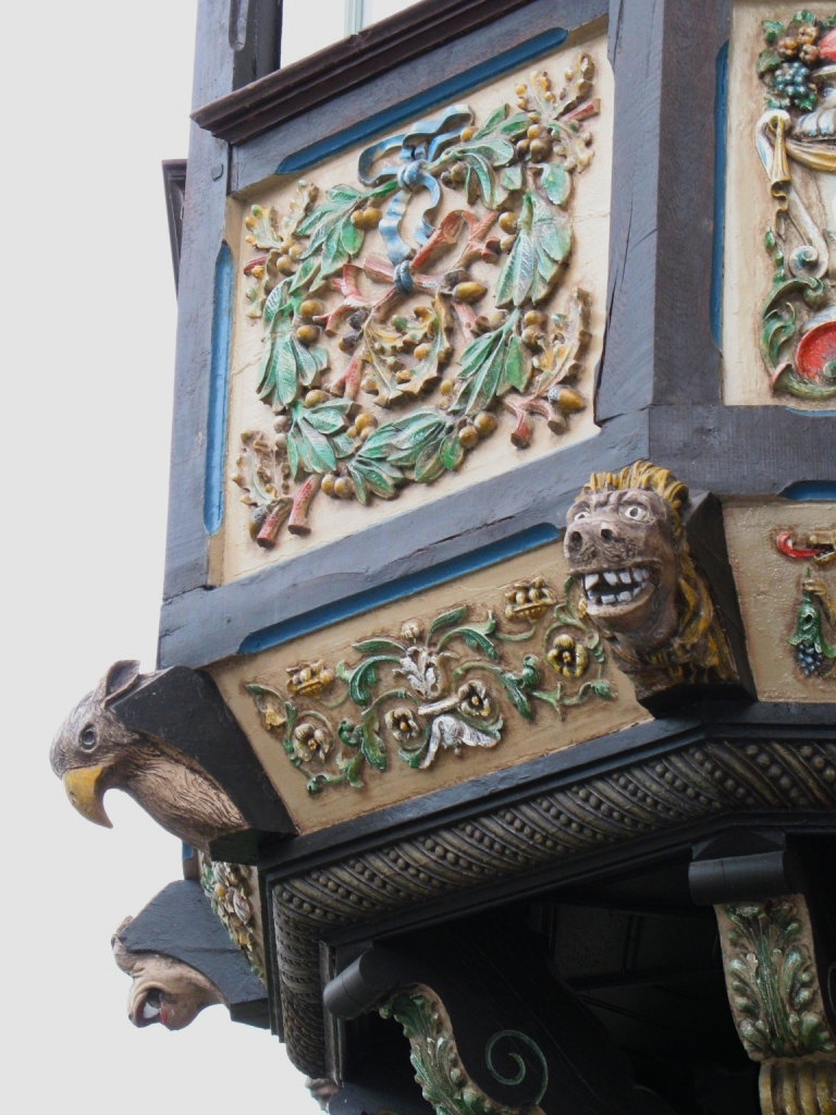 Rheda-Wiedenbrück, "Künstlerhaus" Erker